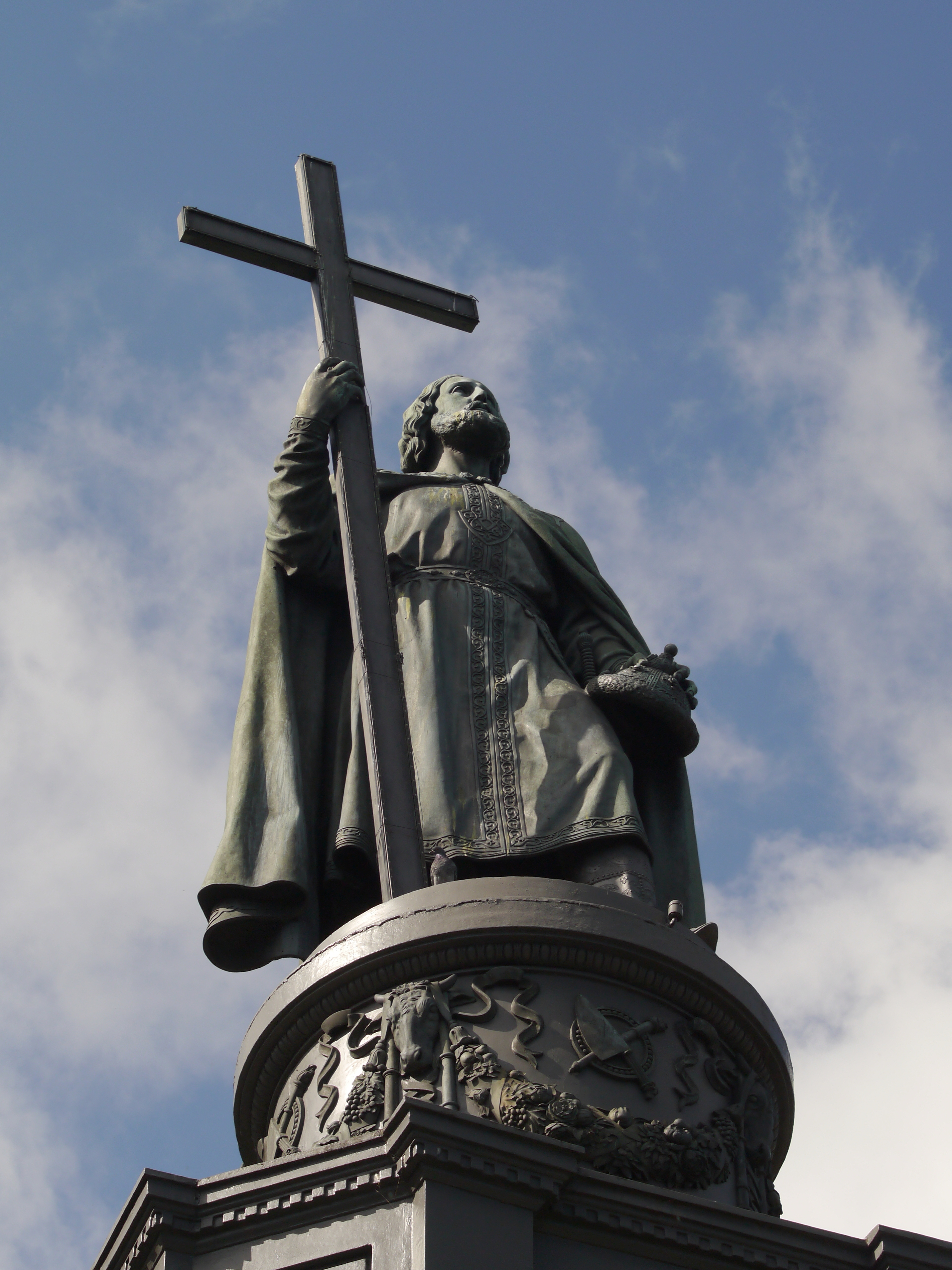 Пам'ятник князю Володимиру, Київ, Володимирська гірка